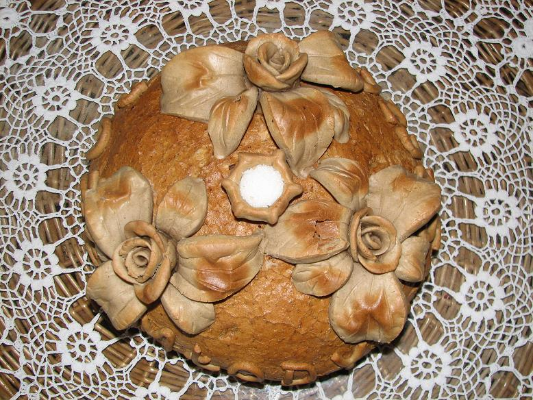 jak to na weselu:) chleb bardzo smaczny, wbrew pozorom